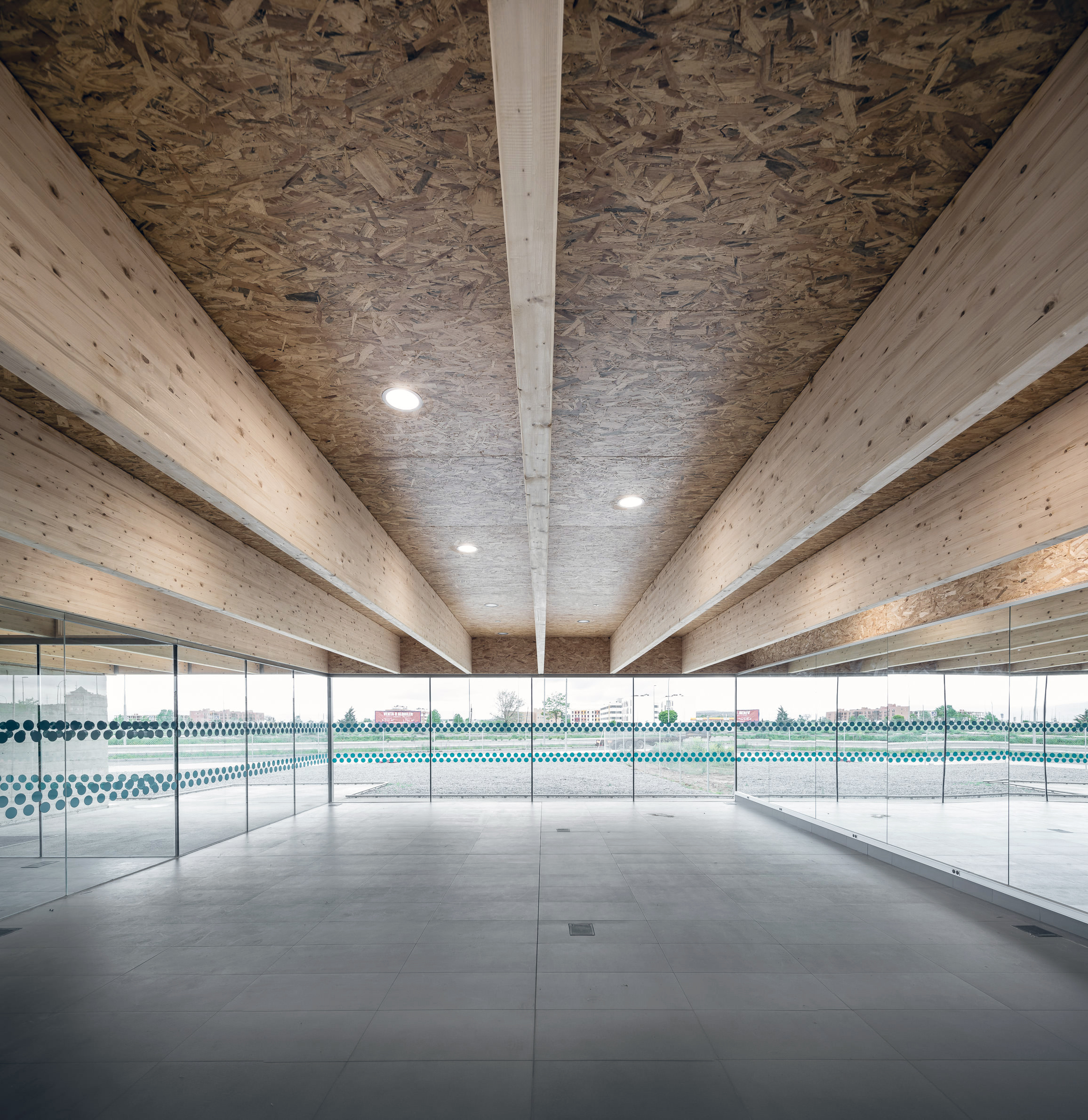 Centro de día ASPAYM avila